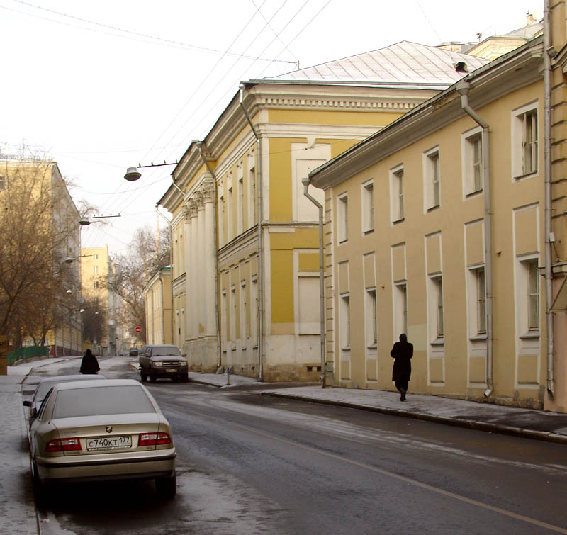 Khlebny Lane, Moscow